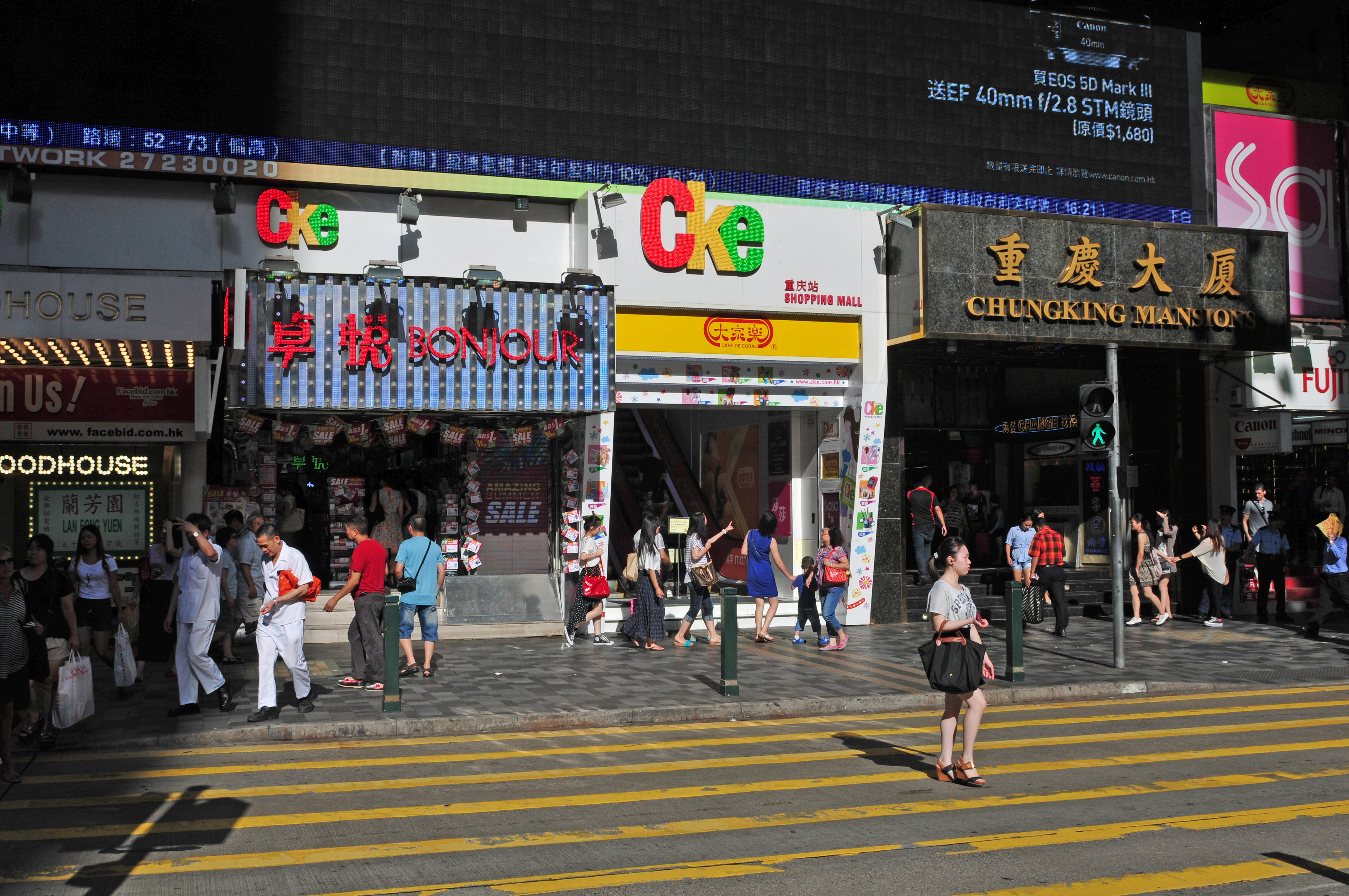 Wikimania 2013 Hongkong